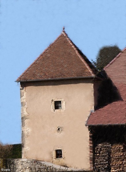 Tour carrée du château d'Evans